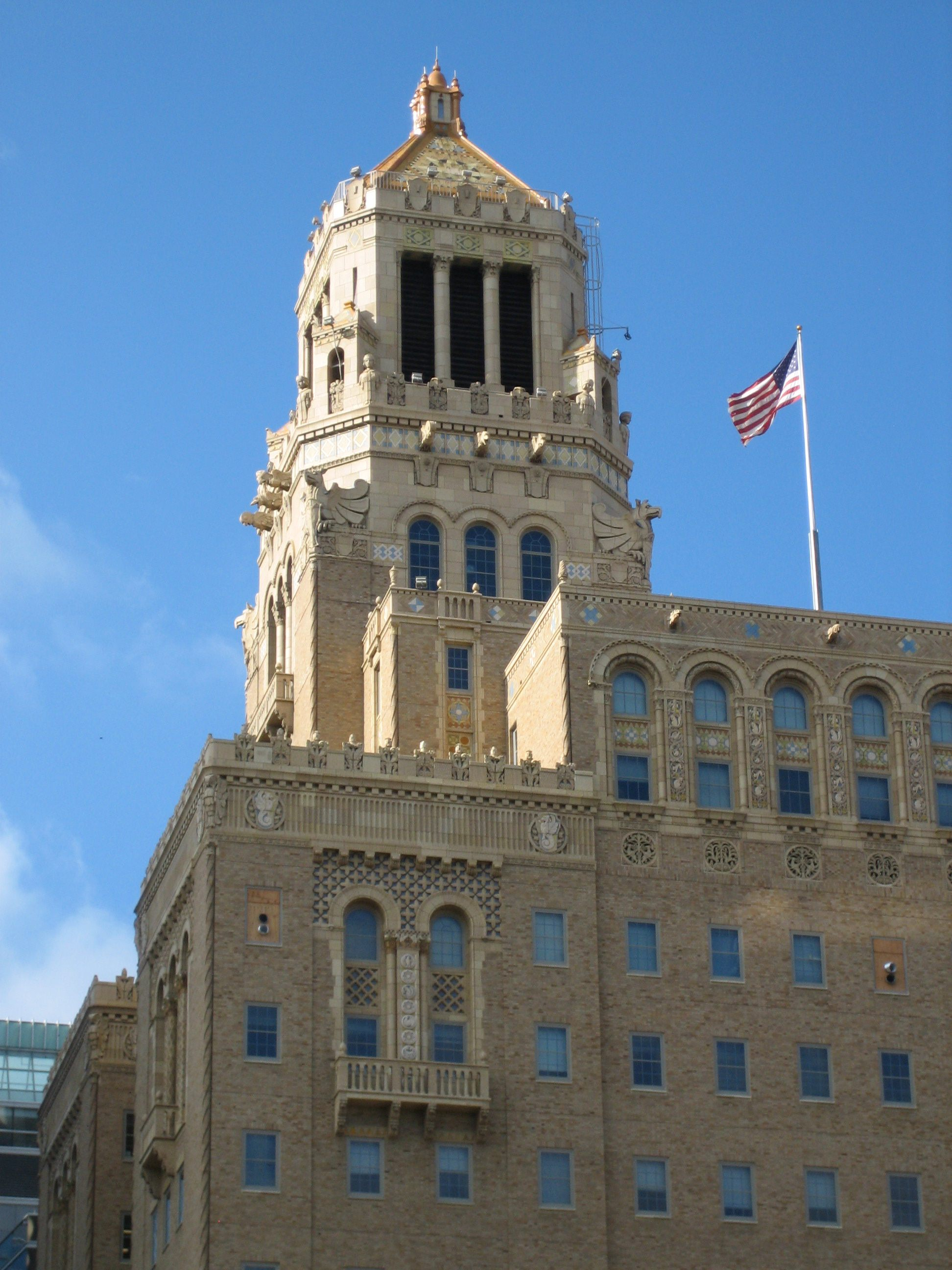 Plummer Building in Rochester, Minnesota